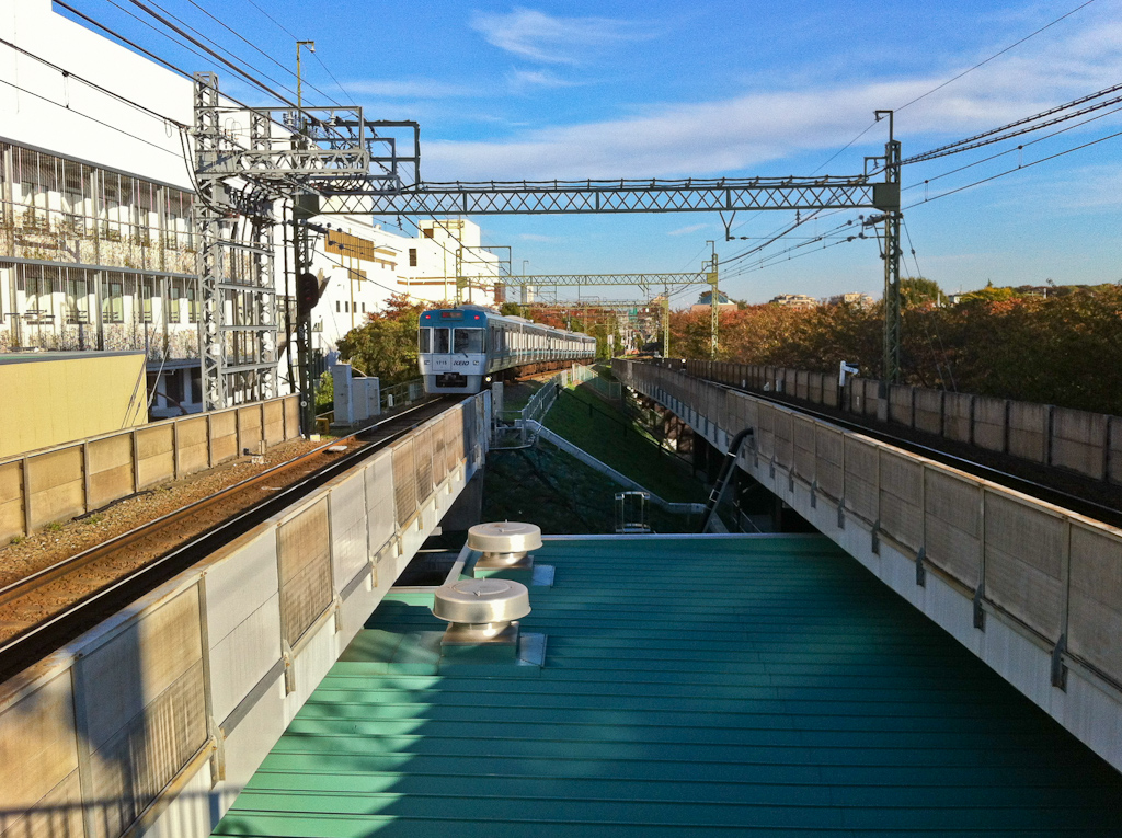 Tokyo, Japan 井王井之頭線高井戶站路段的高架鐵道。